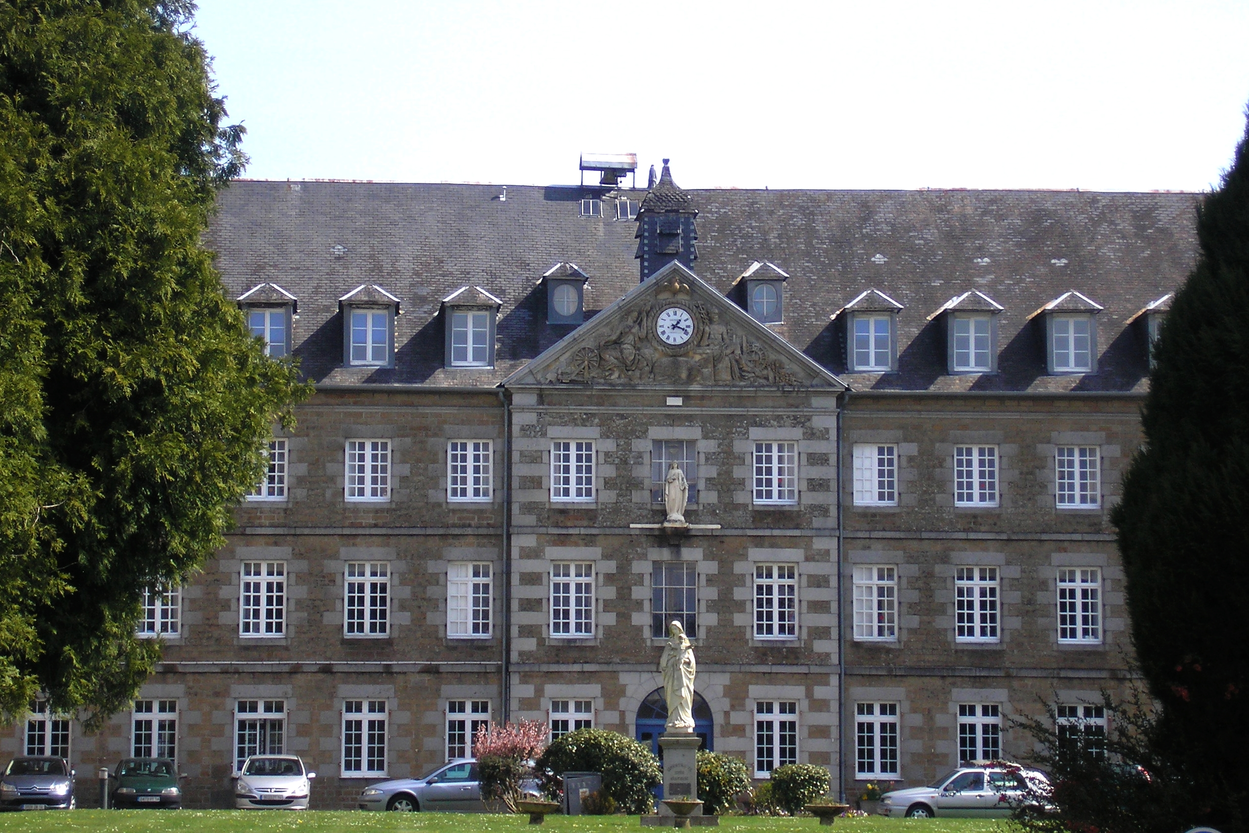 Vaudry (Normandie, France). Bâtiment principal de Blon.